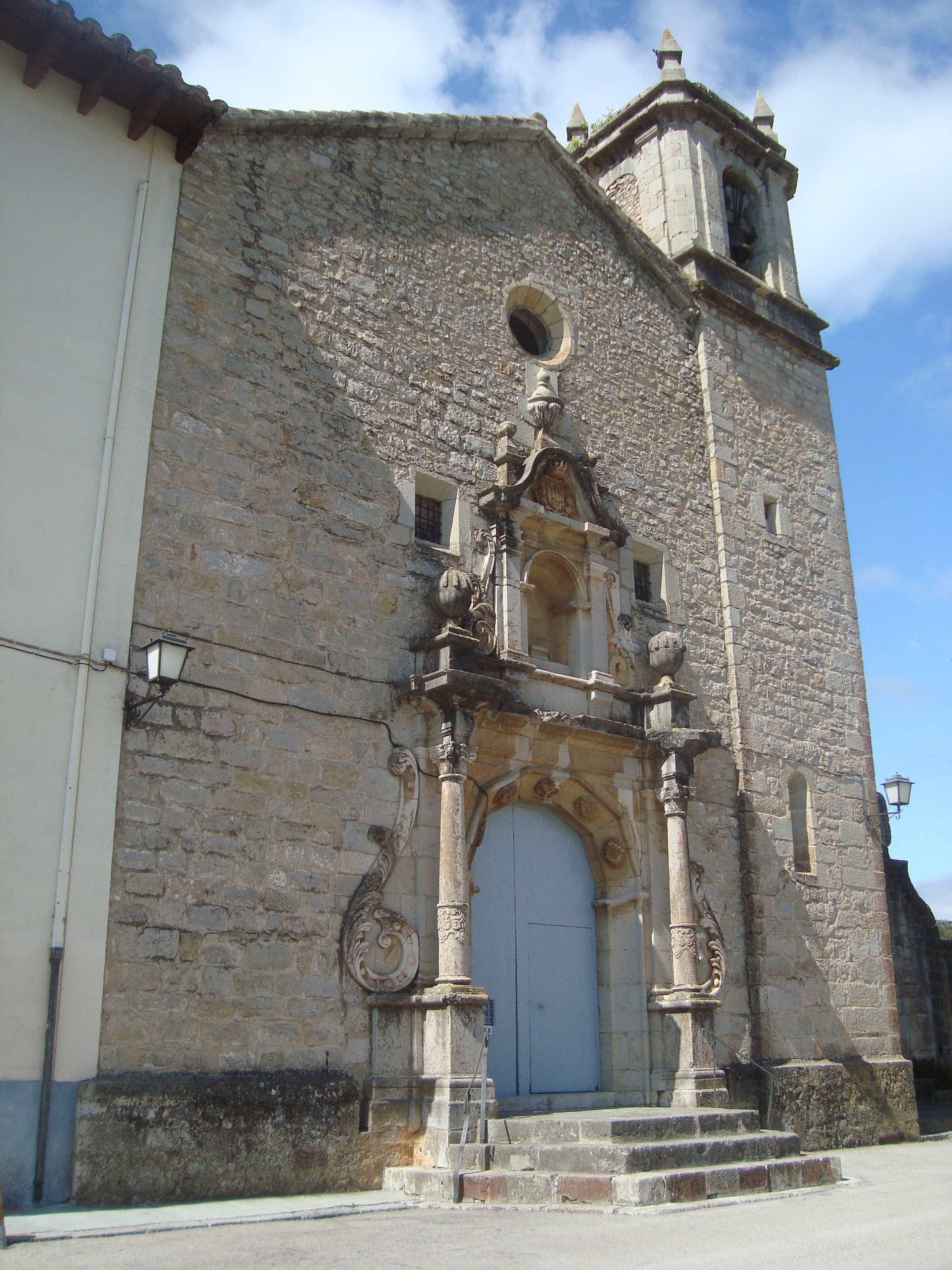 Santuari de la Mare de Déu de Vallivana (Morella) 01.080-014.